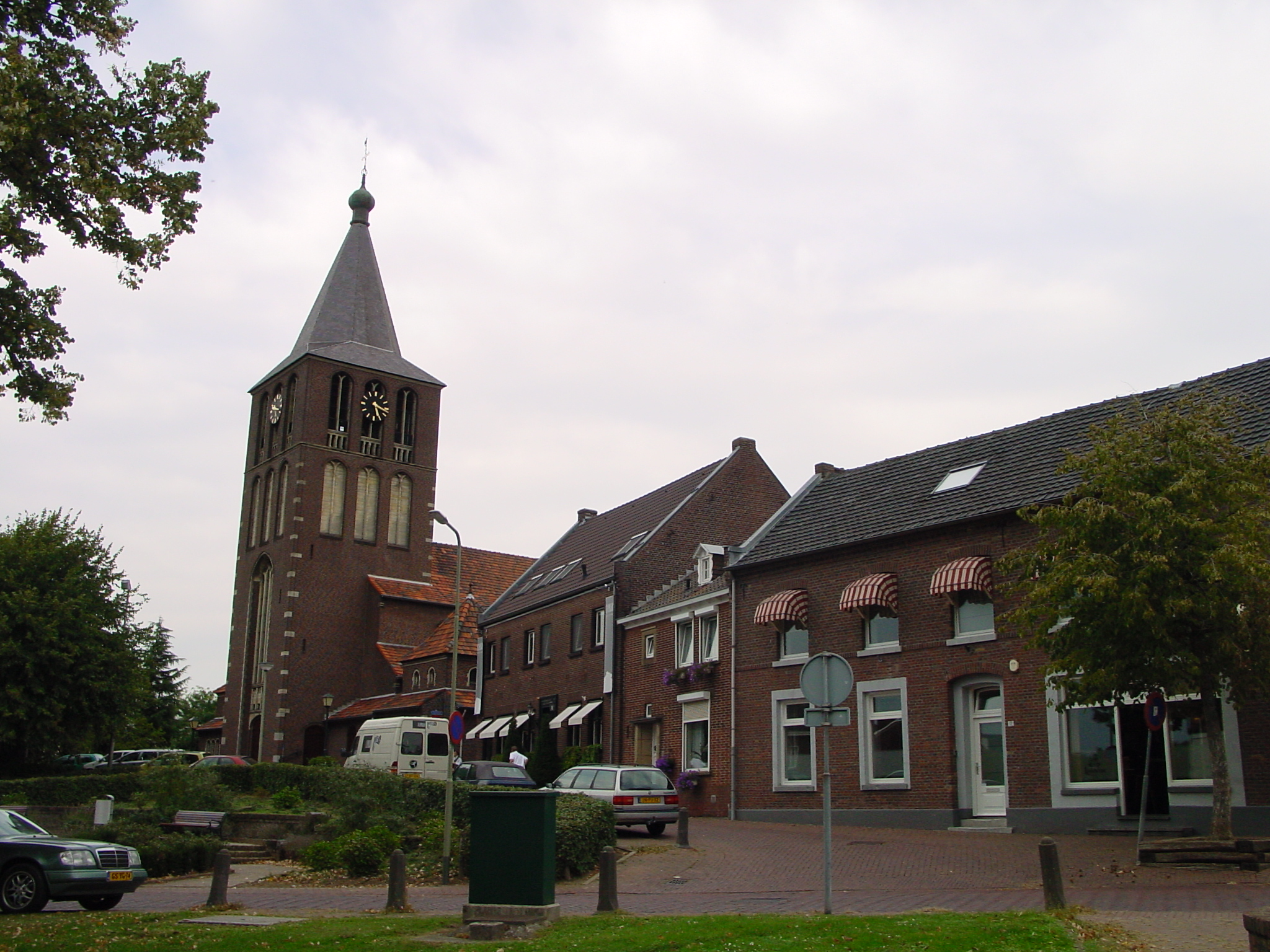 Zelfgemaakte foto van kerk/centrum Herten.